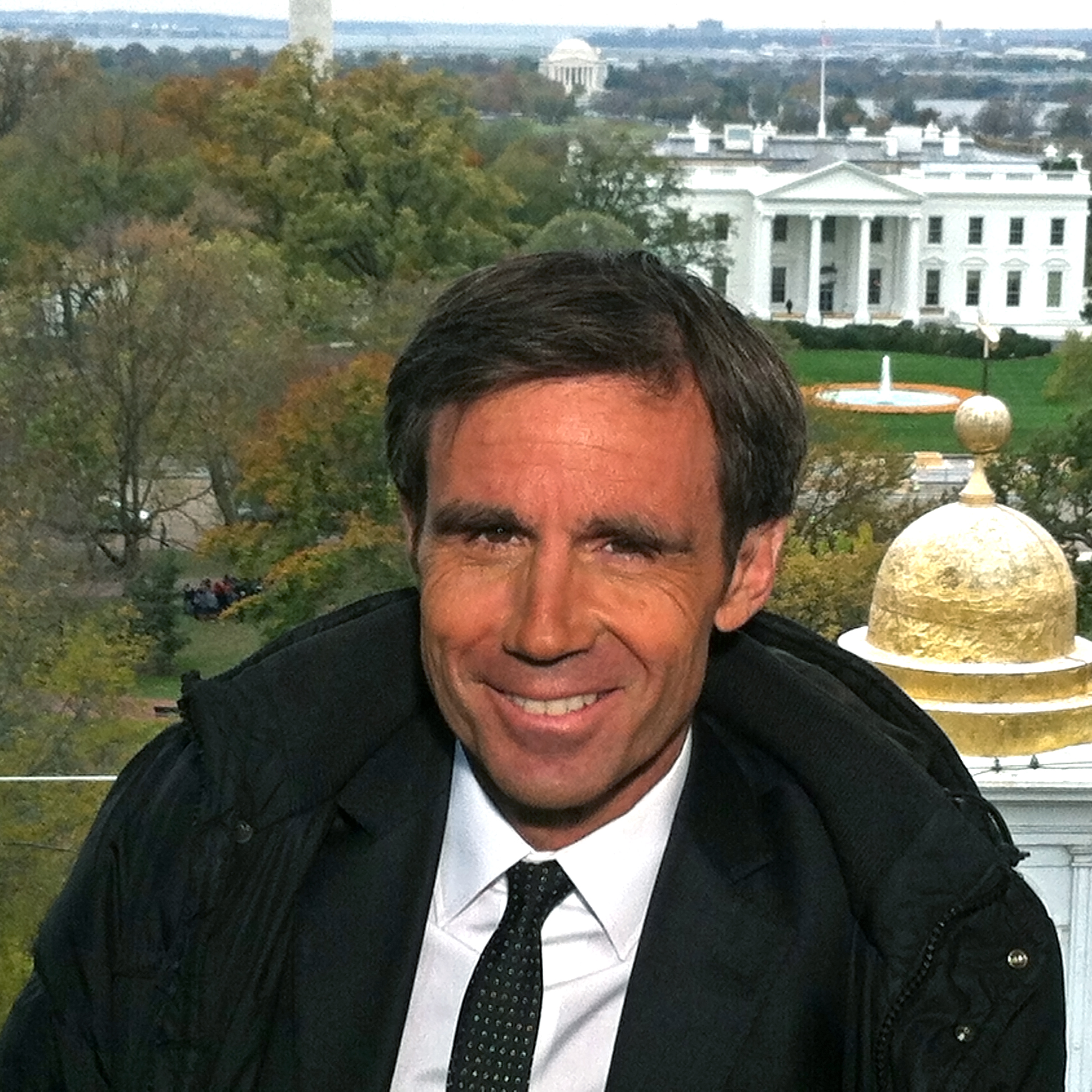 David Pujadas après une interview